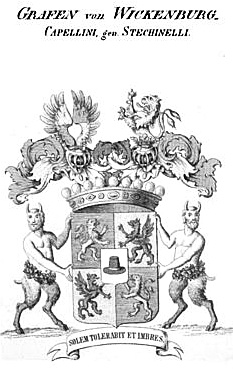 Wappen der Grafen Capellini von Wickenburg, genannt Stechinelli